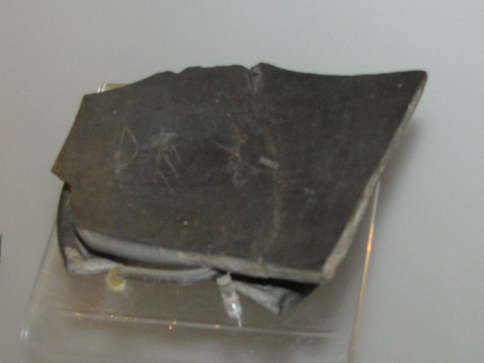 Tesson de bucchero étrusque trouvé près de la Regia, sur le forum romain. Fond portant l'inscription gravée REX. Objet exposé dans la section épigraphique du musée des thermes de Dioclétien, Rome